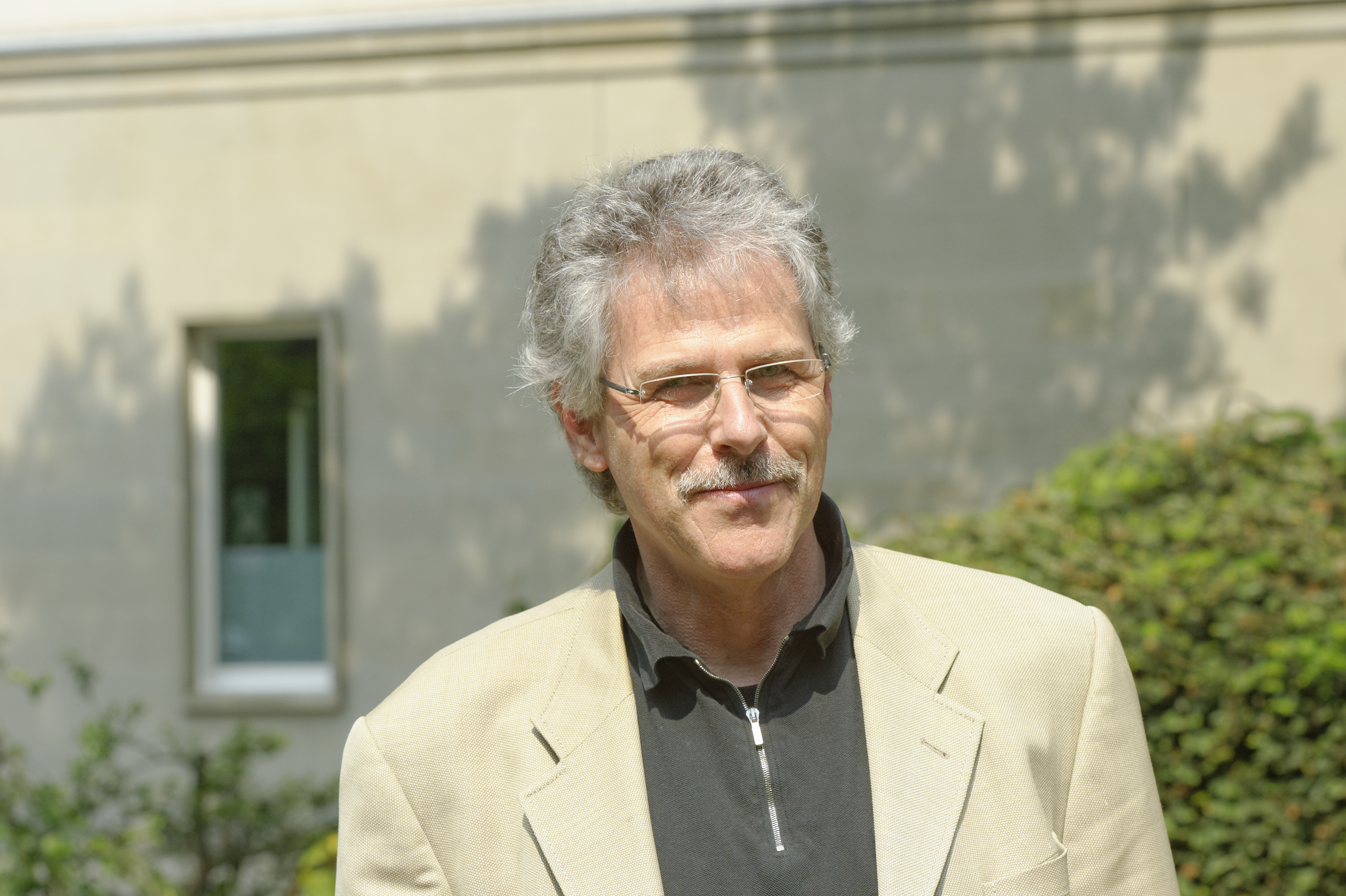 Engelsfest Wuppertal 2013 Manfred Zöllmer